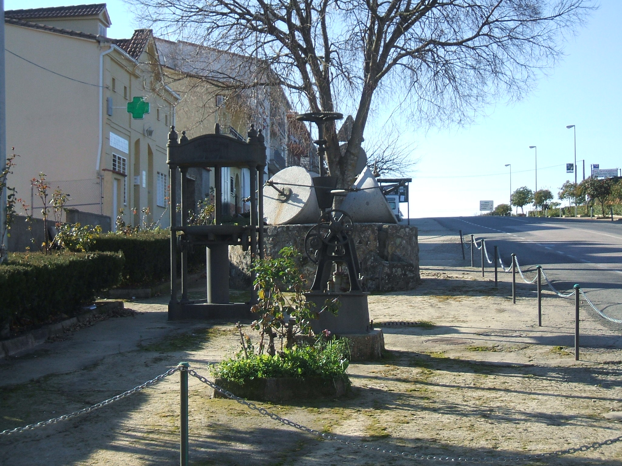 En Villanueva de la Sierra (Cáceres, España) la maquinaria aceitera del pasado se utiliza como elemento decorativo de parques y calles.